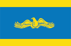 Прапор Устинівського району